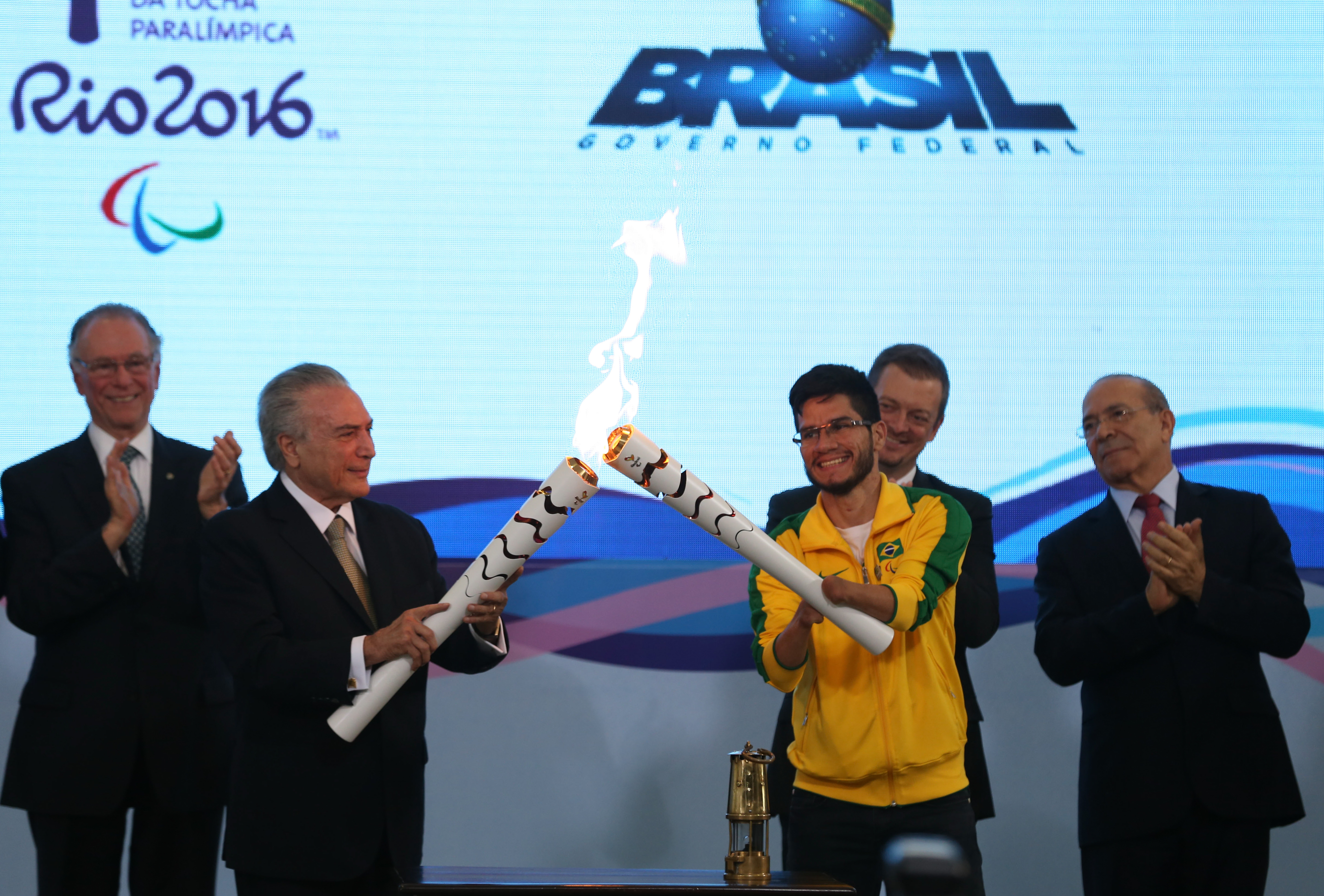 Brasília - O presidente interino Michel Temer e o velocista Yohansson Nascimento acendem a tocha paralímpica no Palácio do Planalto (Valter Campanato/Agência Brasil)